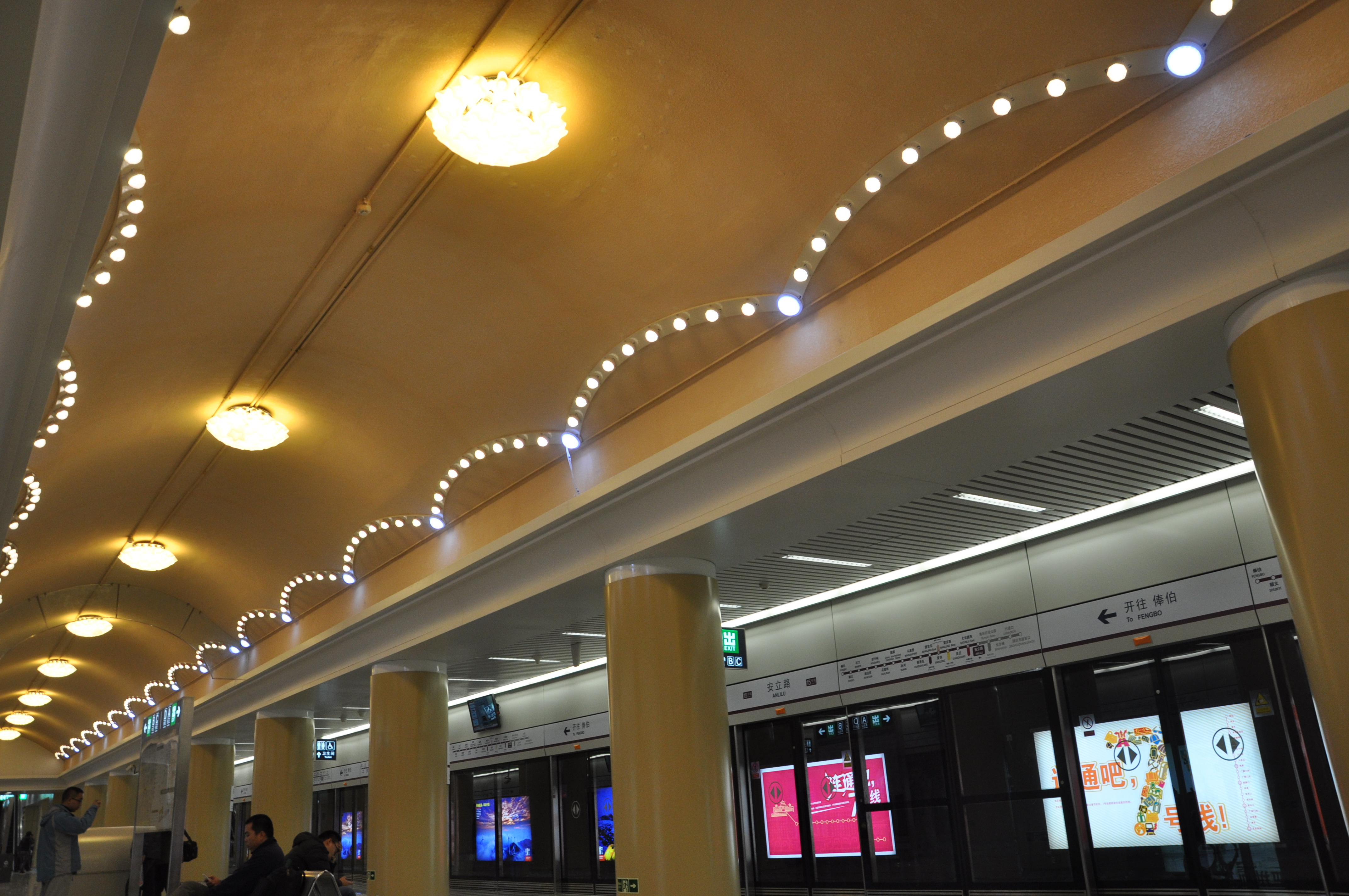 北京地铁15号线安立路站站台